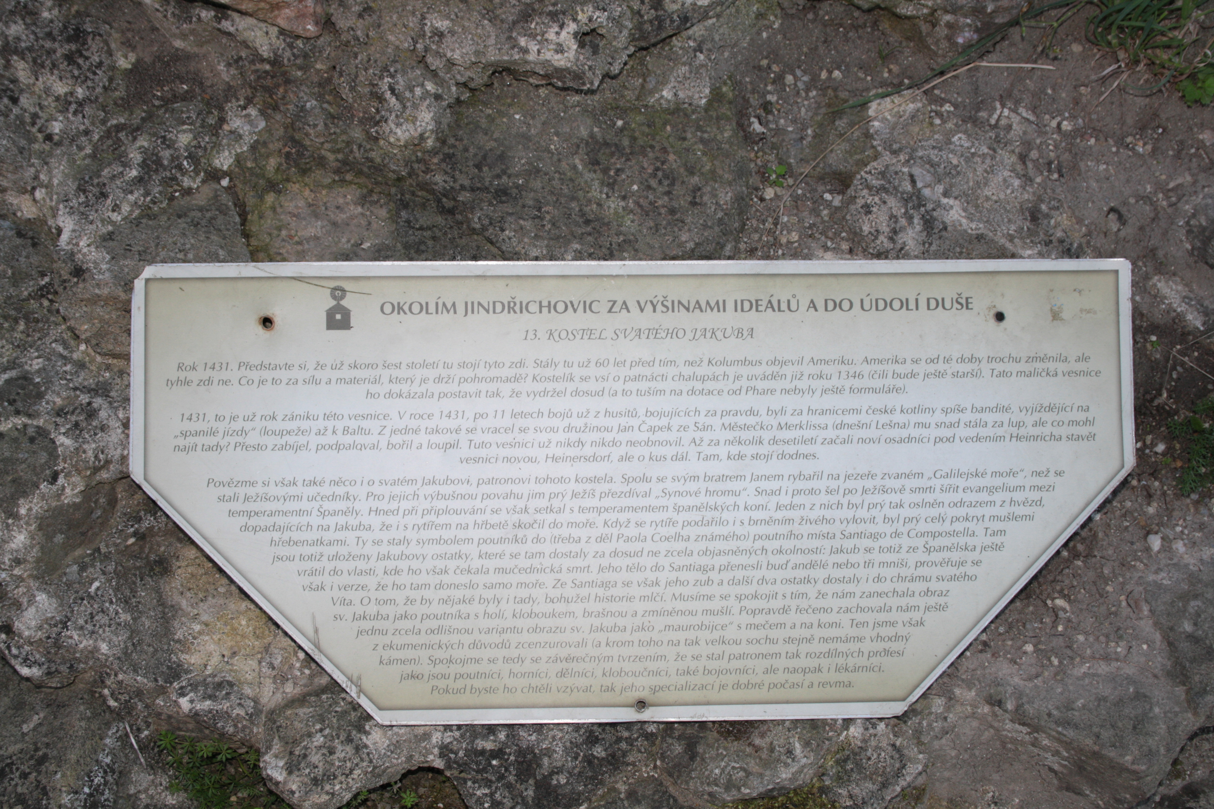 Informační cedule u kostela svatého Jakuba v Jindřichovicích pdo Smrkem.